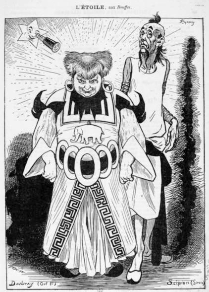 « L'Étoile, aux Bouffes ». Dessin de presse de Félix Régamey (1844-1907). L'Étoile, opéra-bouffe en 3 actes, livret d'Eugène Leterrier et Albert Vanloo, musique d'Emmanuel Chabrier, créé aux Théâtre des Bouffes-Parisiens le 28 novembre 1877, avec Daubray dans le rôle d'Ouf 1er et Étienne Scipion dans le rôle de Siroco.